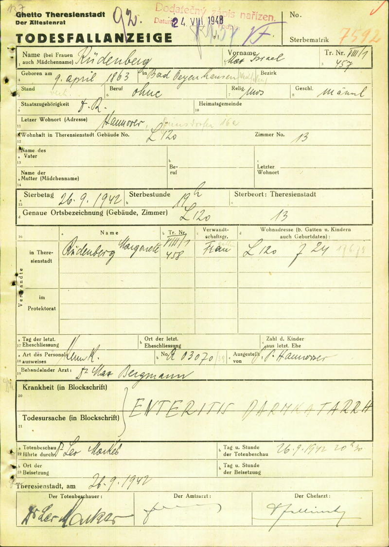 Ausgefüllter Vordruck Todesfallanzeige für Max Rüdenberg von "Der Ältestenrat" des Ghettos Theresienstadt, veröffentlicht durch das Institut Theresienstädter Initiative (Institut Terezínské iniciativi